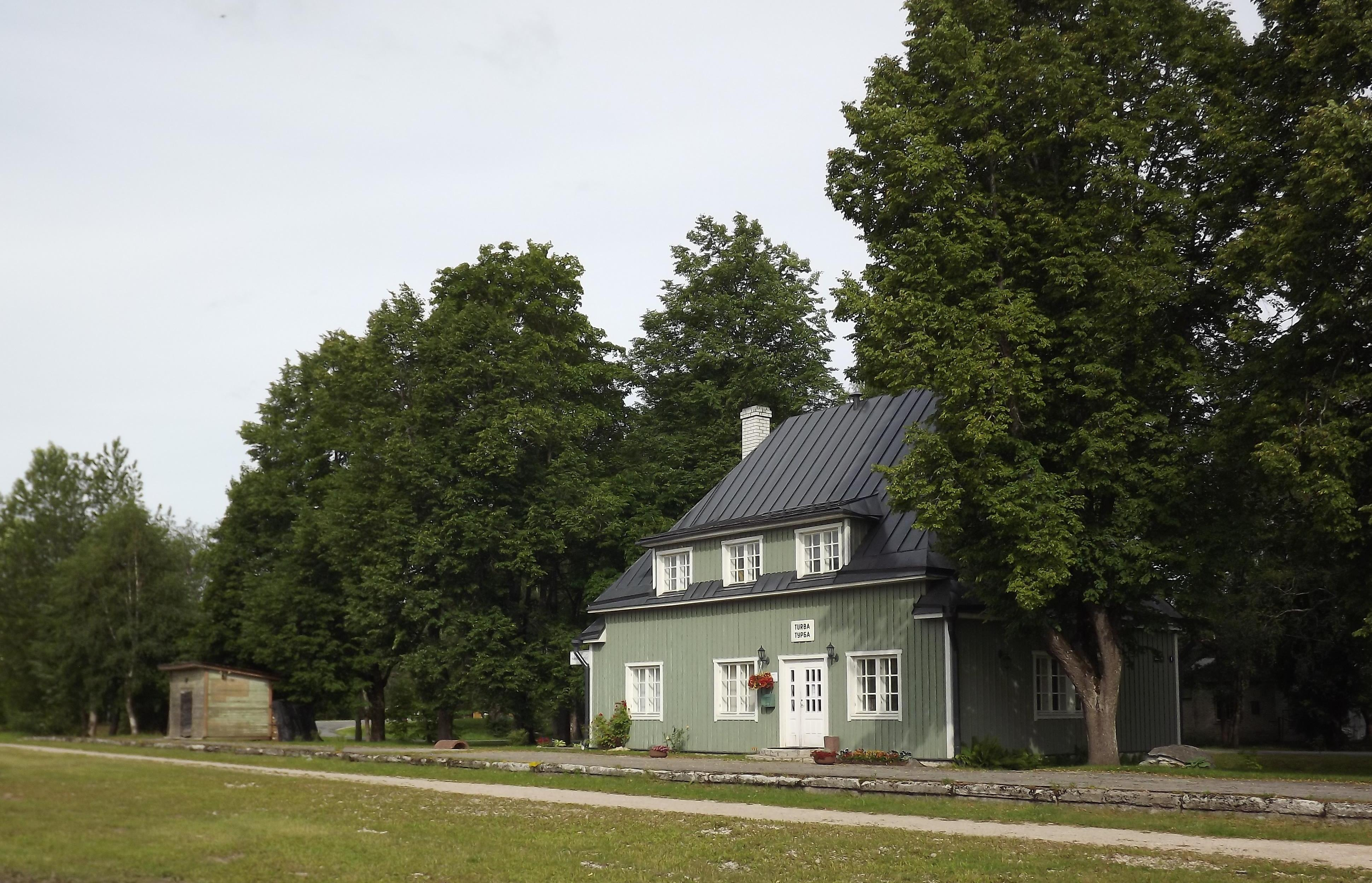 Endine Turba raudteejaam.